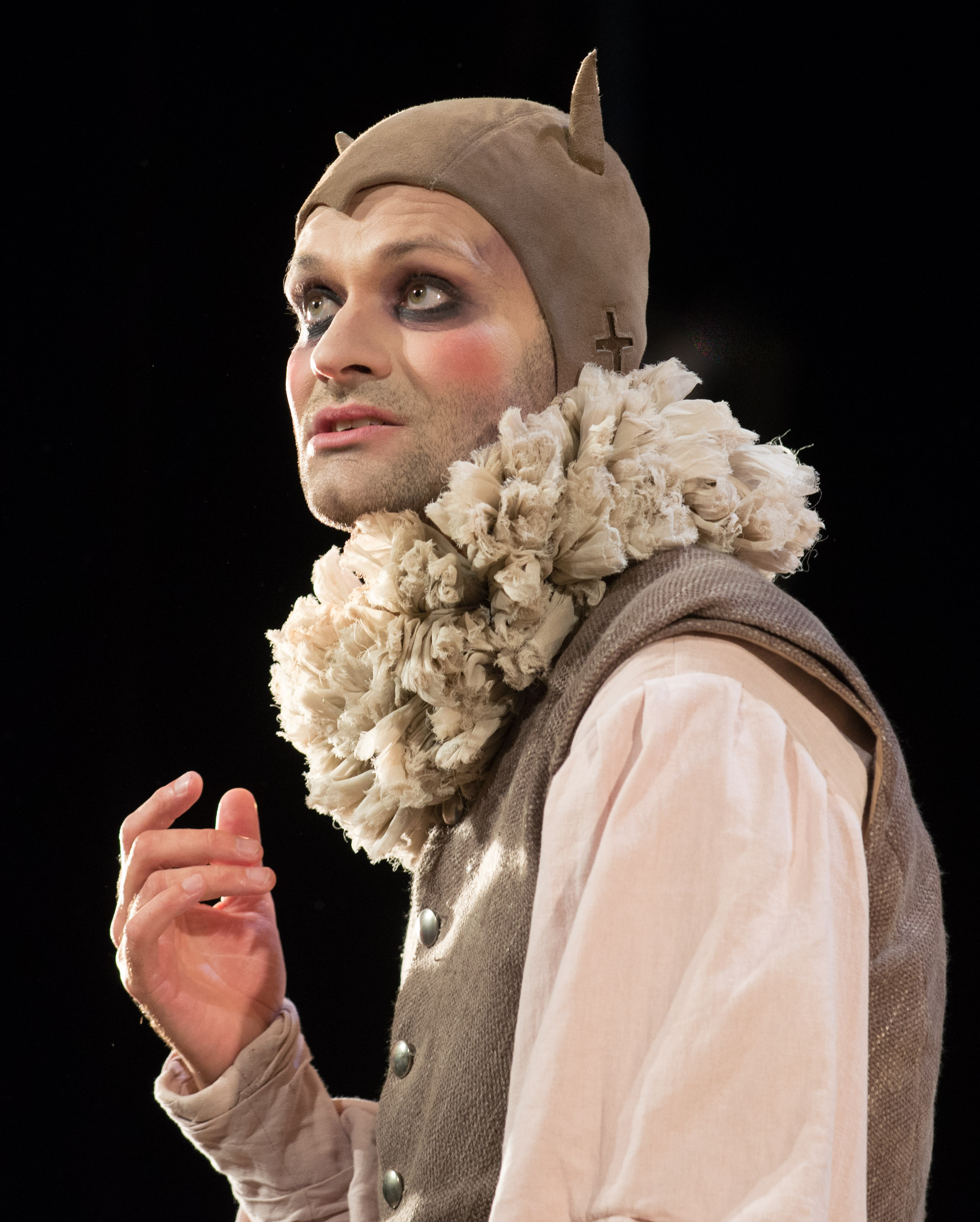 Lindy Larsson som narren i Trettondagsafton under Öppet Hus på Dramaten den 19 september 2015.